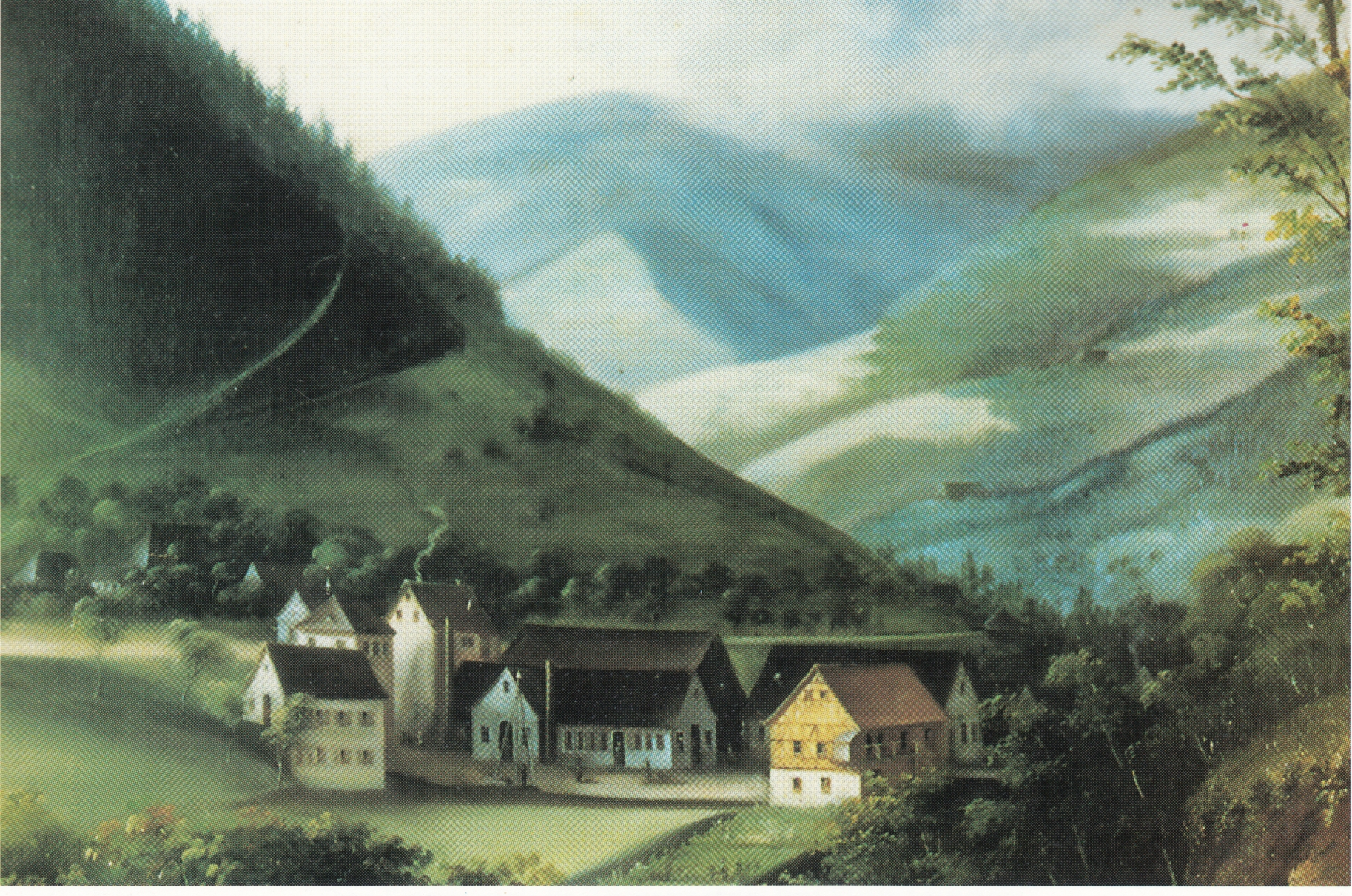 Werksanlagen der Firma Ph. Ant. Fauler in Falkensteig, Gemälde von 1854